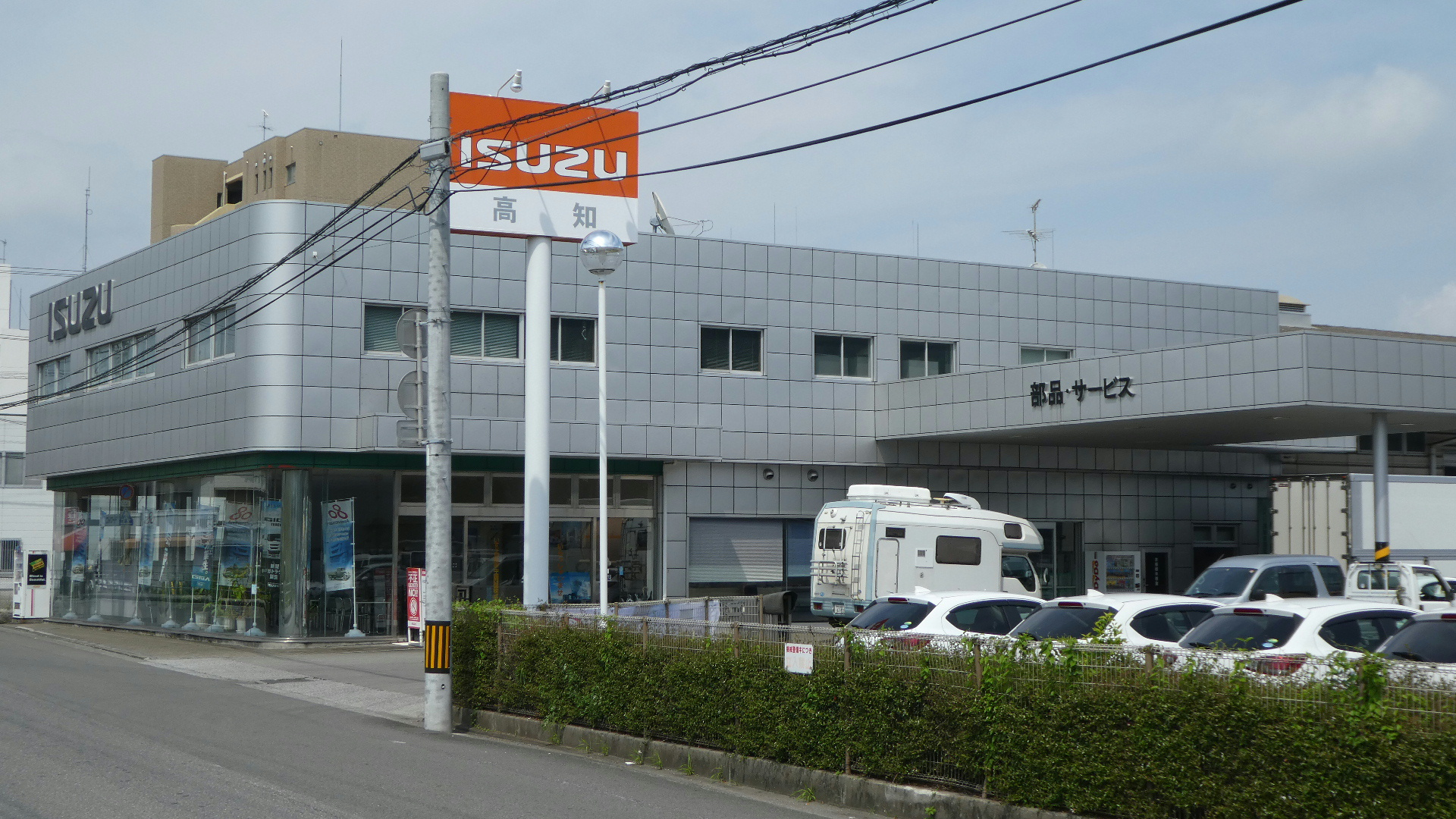 いすゞ自動車中国四国, 高知支店